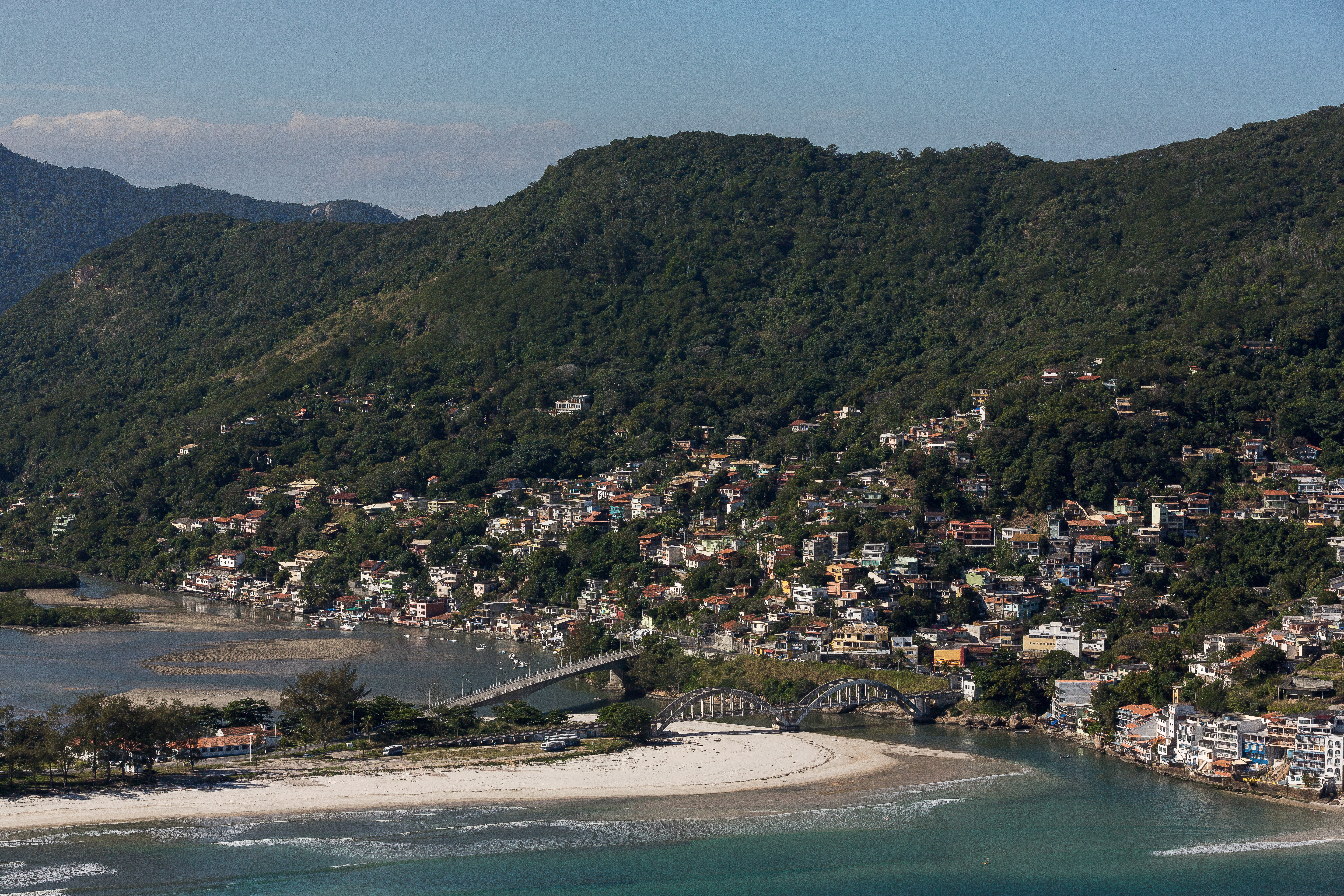 Vista aérea da Barra de Guaratiba, Rio de Janeiro - RJ - Brasil.